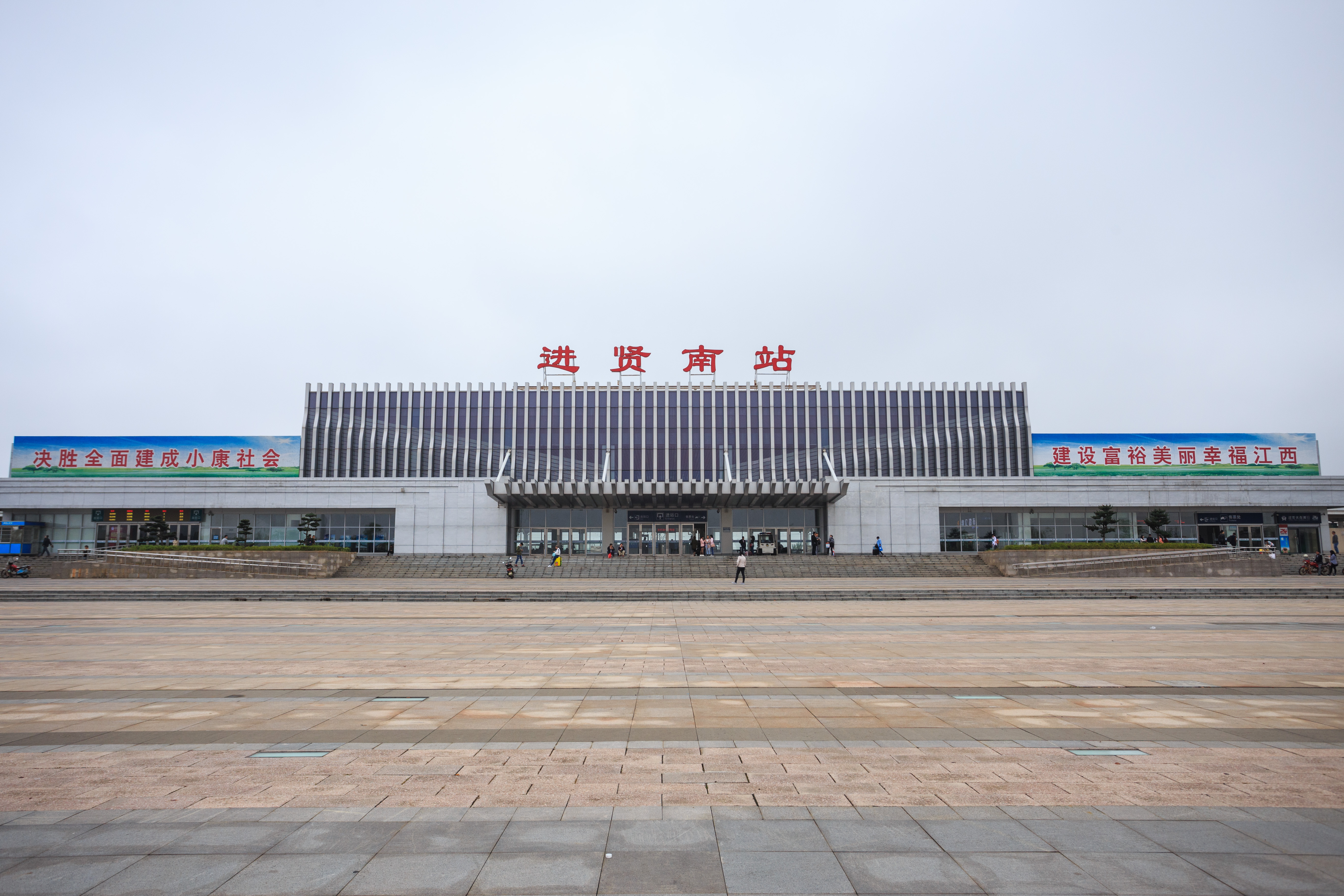 进贤南站